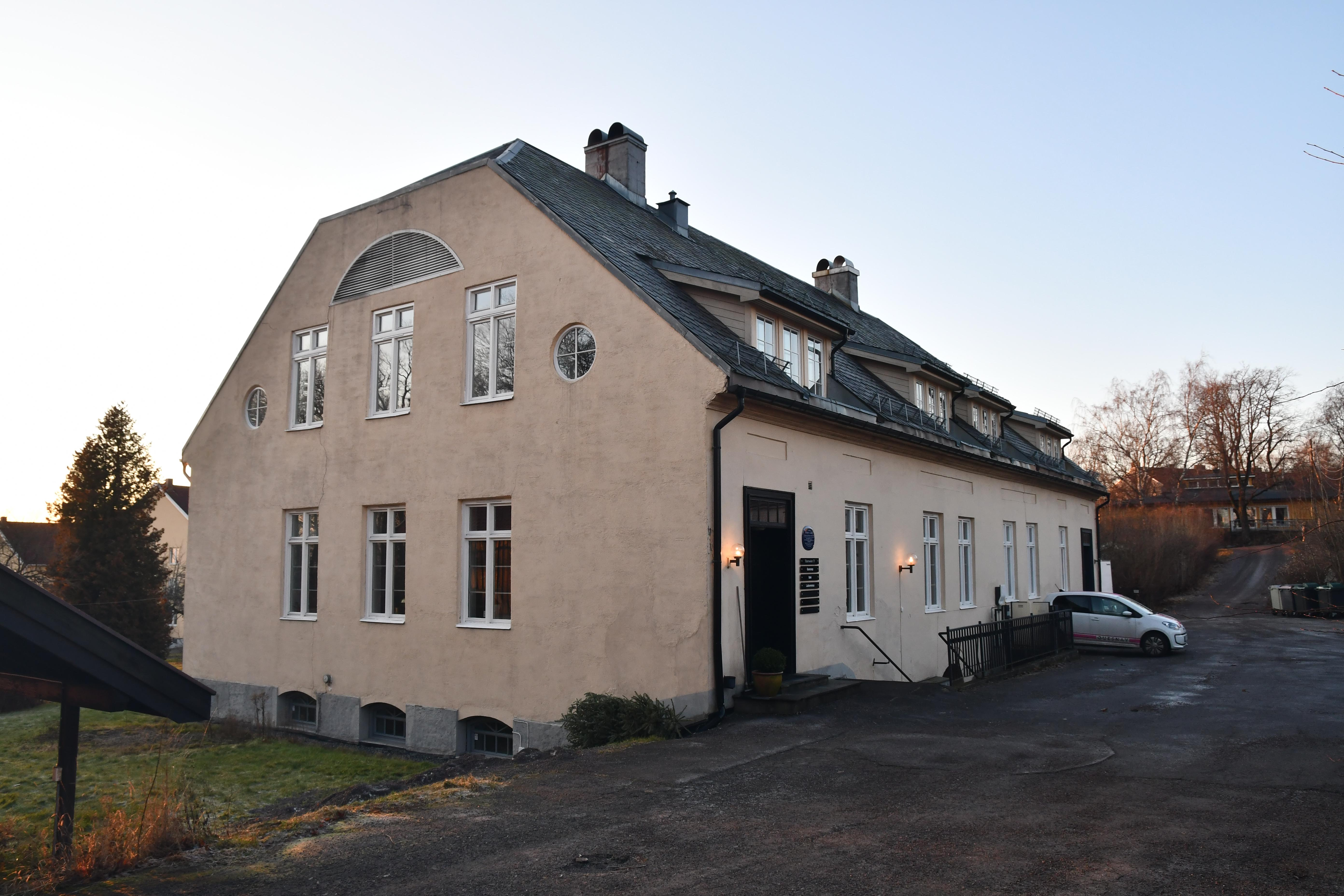 Søndre Tåsen gård, Tåsenveien 71, Tåsen, hovedbygning oppført 1816